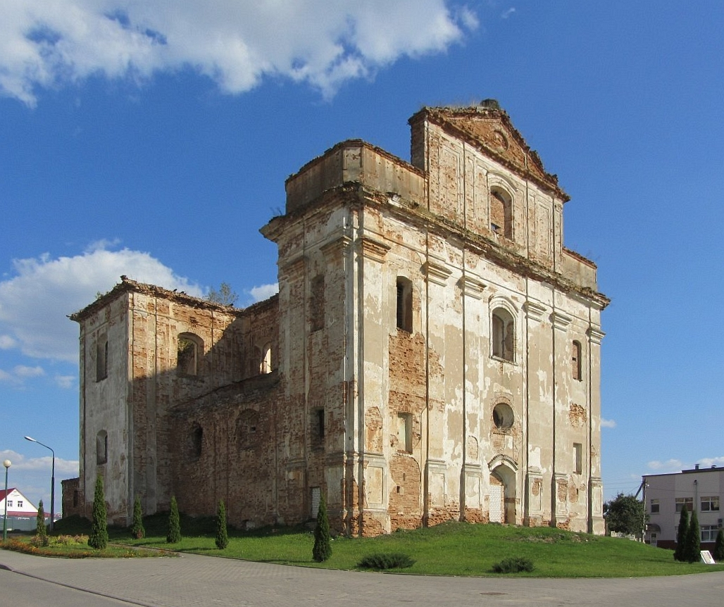 Вялікая Бераставіца Касцёл Дабравешчання